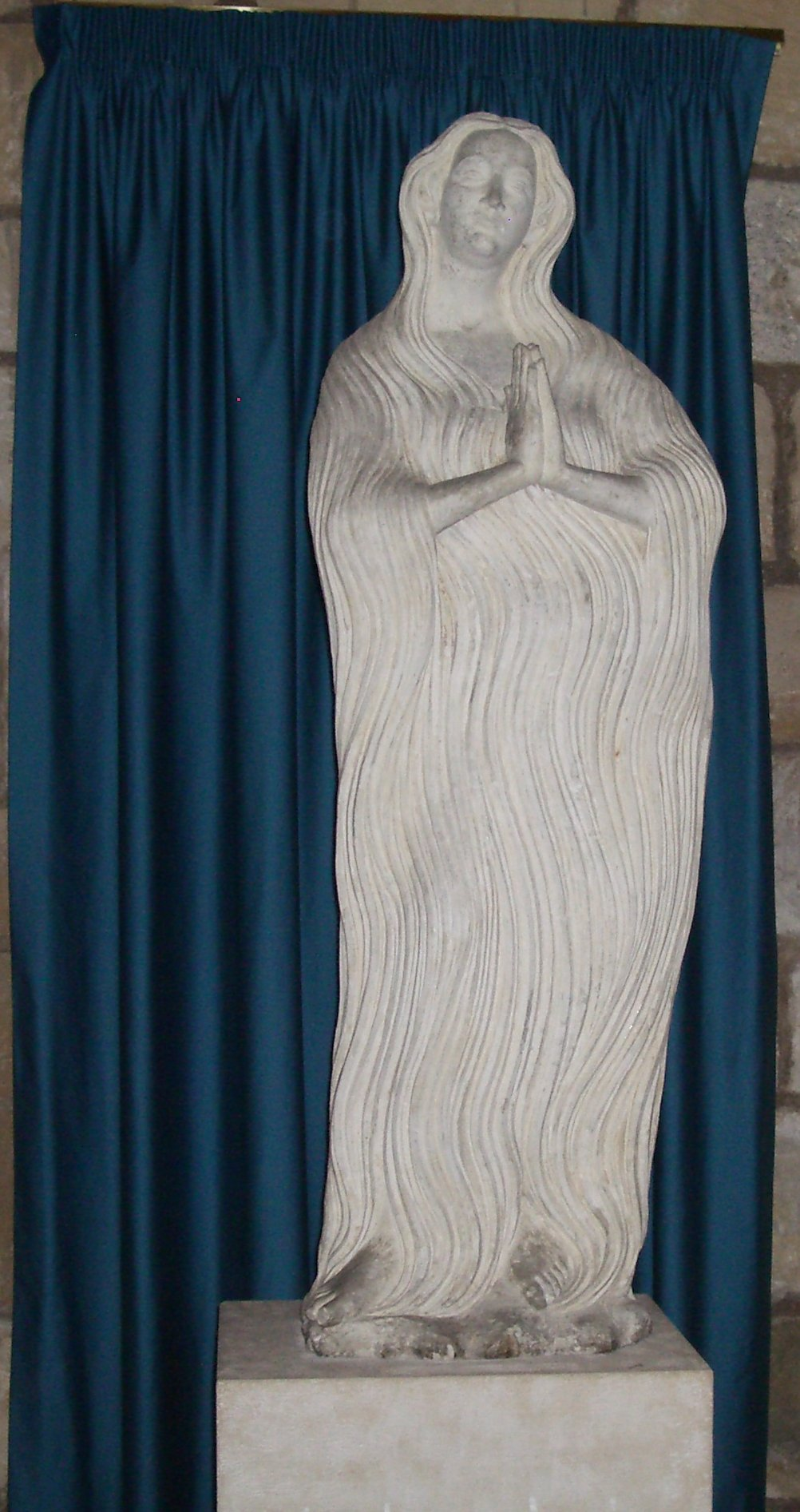 Collégiale d'Écouis - statuaire - Marie l'Egyptienne